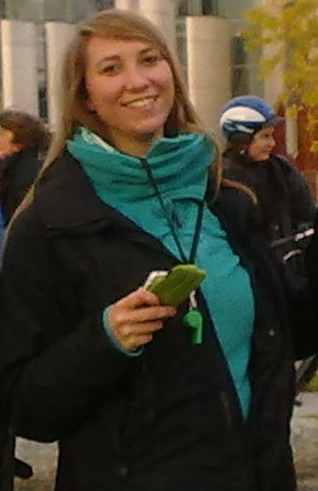 Emily Büning bei der Antiatommenschenkette am 28.10.2010 in Berlin